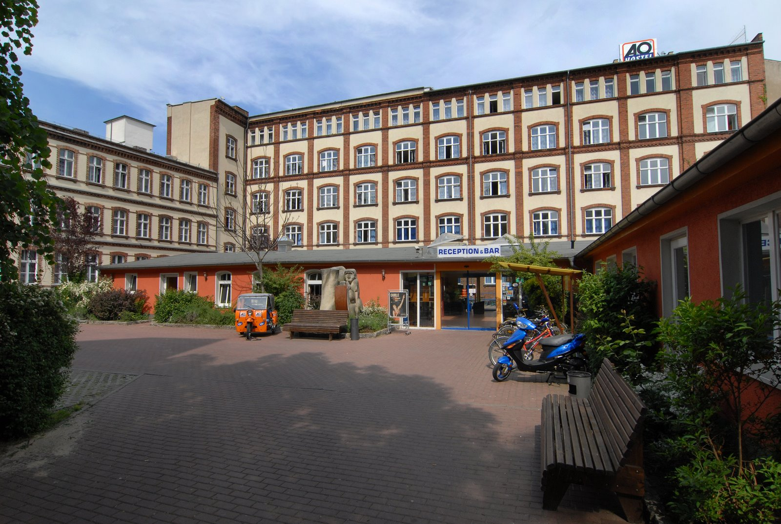 Das Foto zeigt die Frontansicht das A&O Berlin Friedrichshain. Das Gebäude gehört zum Block 74.